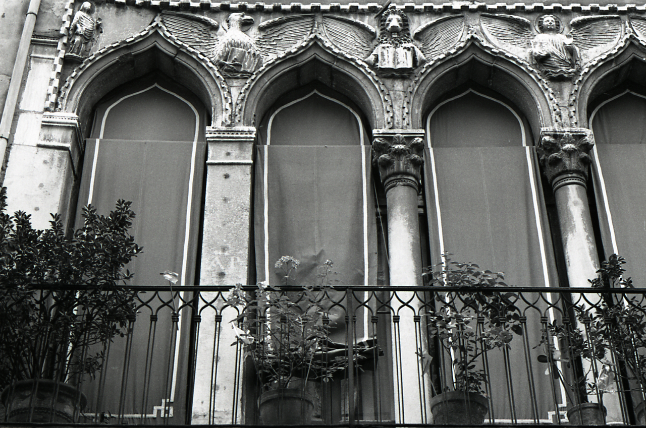 Servizio fotografico : Venezia, 1968 / Paolo Monti. - Strisce: 7, Fotogrammi complessivi: 36 : Negativo b/n, gelatina bromuro d'argento/ pellicola ; 35 mm. - ((I fotogrammi hanno una doppia numerazione. . - Sul portanegativi: Nikon Agfa 21. - Sul dorso del portanegativi Monti specifica: "Muri, calle con ponte". - Probabilmente questa specifica in penna biro rossa si riferisce a ricerche personali che esulano dal contesto del servizio commissionato da Electa. - Occasione: Pubblicazione: "Edoardo ARSLAN, Venezia gotica: architettura civile gotica veneziana, Milano, Electa, 1970". - Fonte: Agenda di Paolo Monti: Venezia Architettura Gotica Civile / Ed. Electa maggio/giugno 1968 (1968/05-1968/06), presso Archivio Paolo Monti